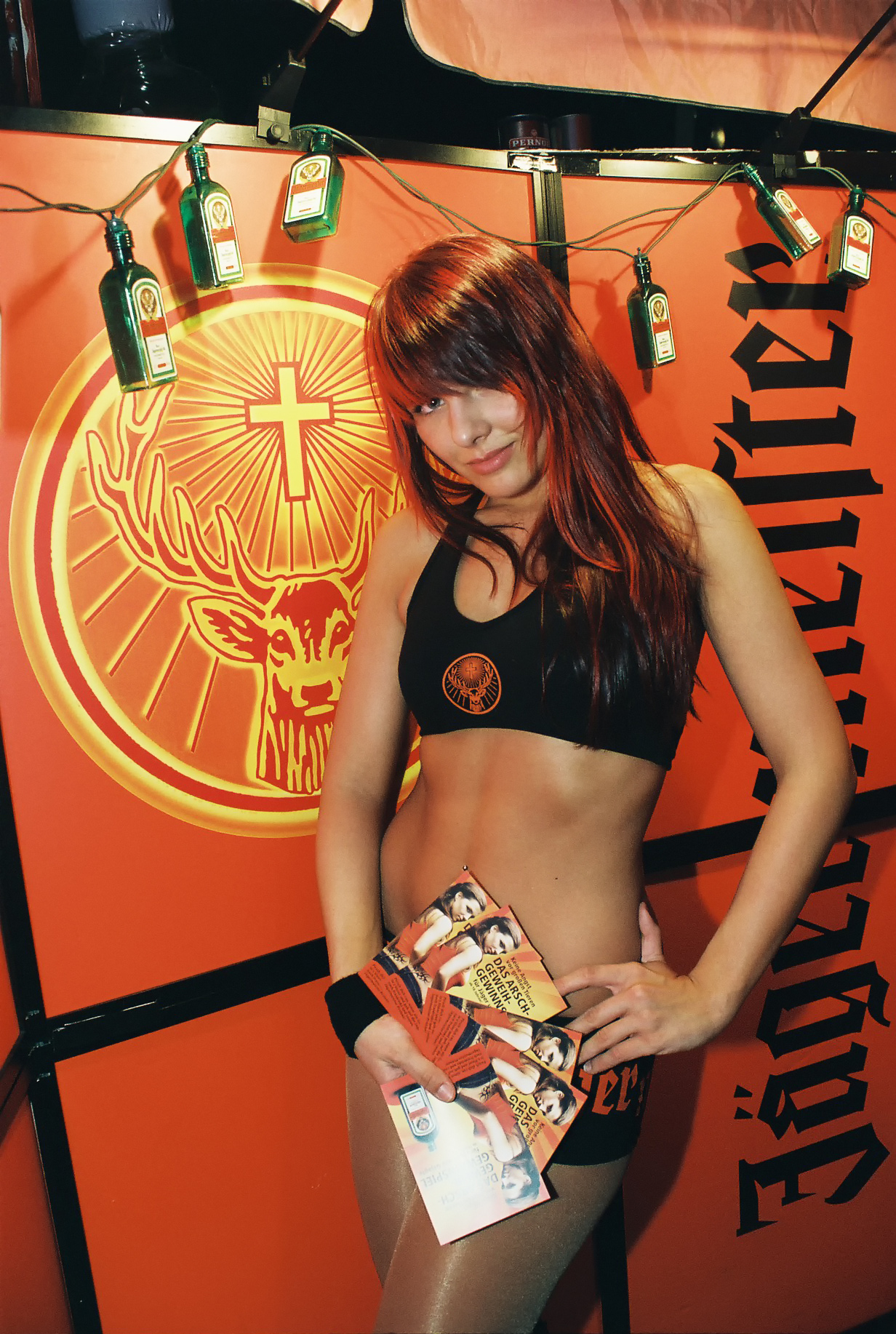 Miss Arschgeweih 2006 in Eberswalde, Discothek Awerk - die dargestellten Personen haben der Veröffentlichung zugestimmt und verzichtet auf das Recht am eigenen Bild gemäß § 22 Kunsturheberrechtsgesetz